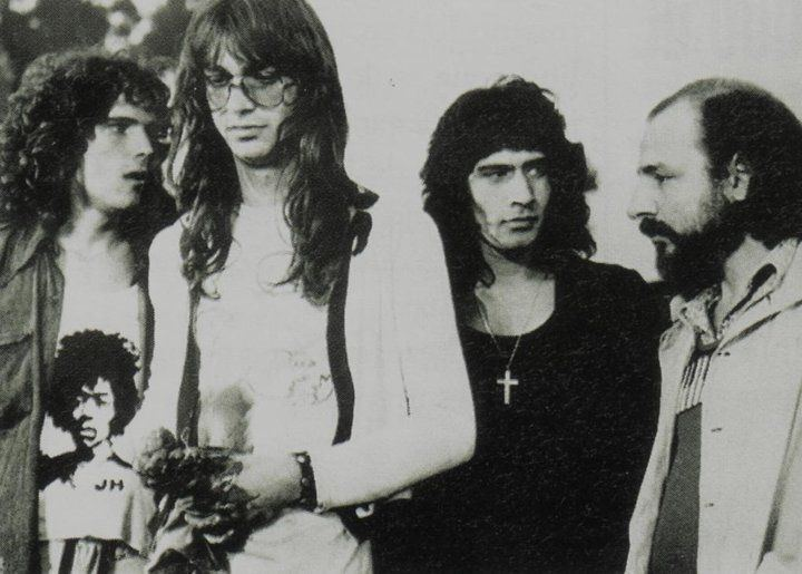 Pescado Rabioso circa 1973.